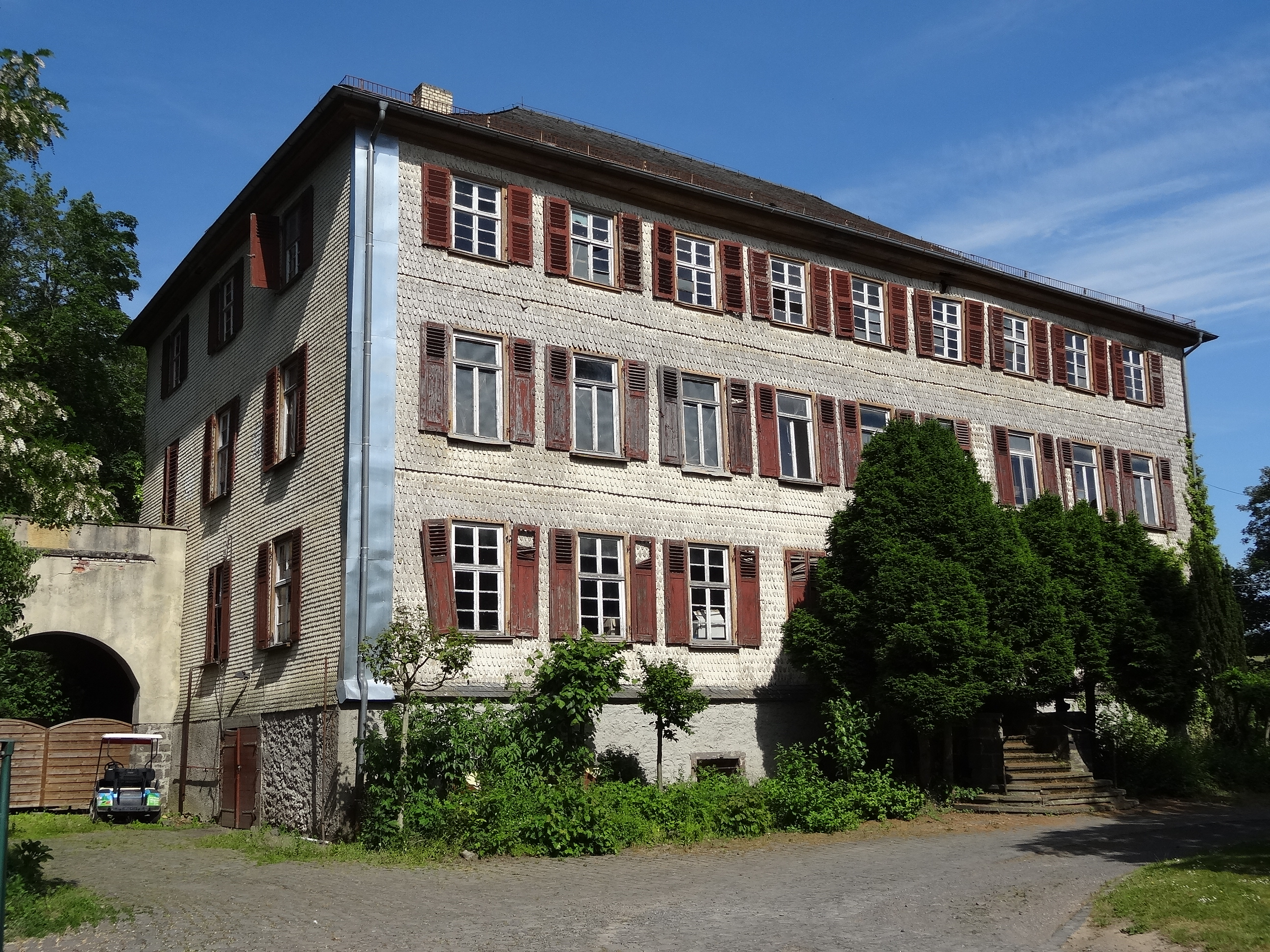 Sachgesamtheit Herrenhaus, Gutshof und ehemaliger Park (Winnerod)